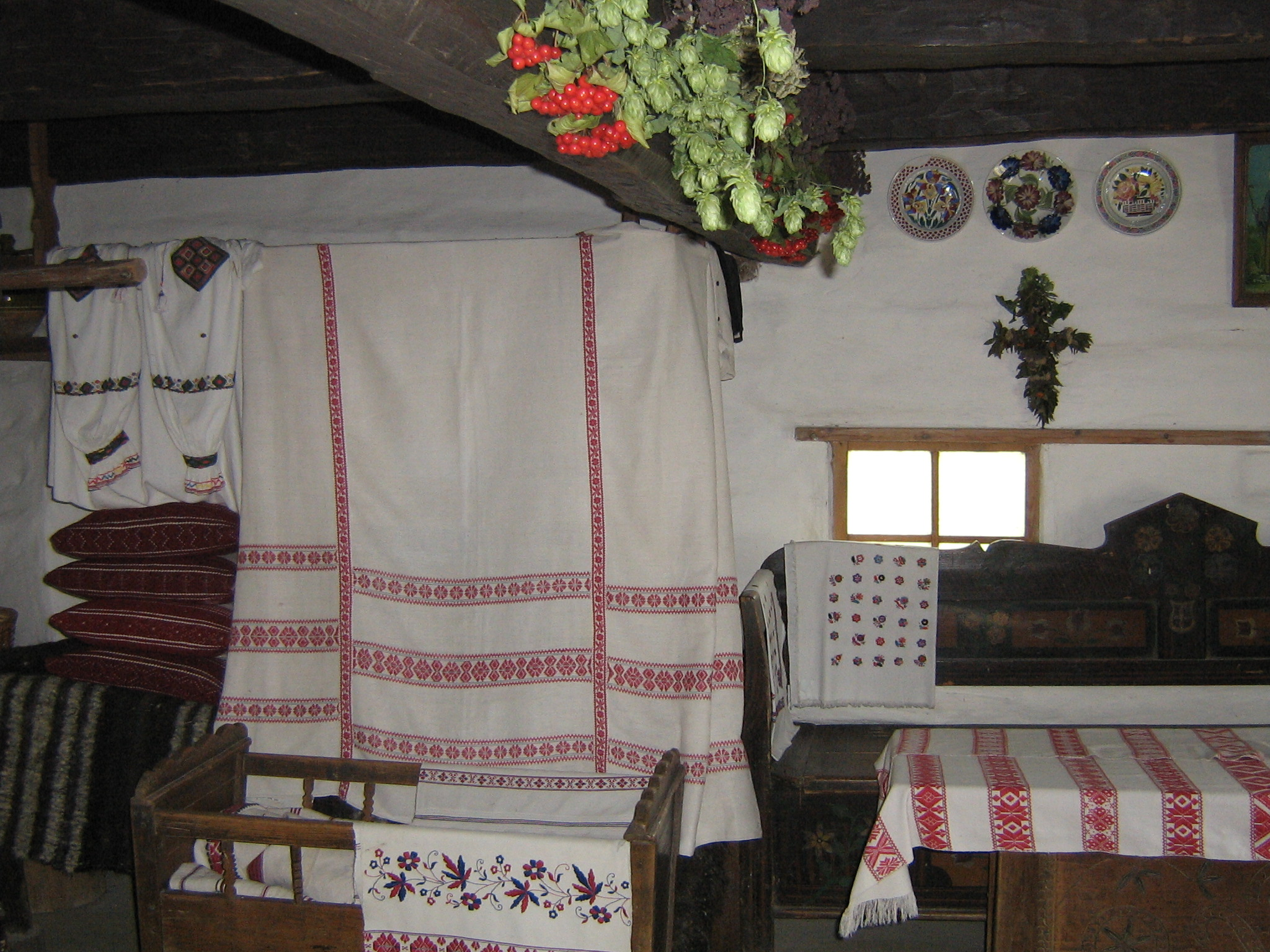 Przykładowe wykorzystanie rusznika.